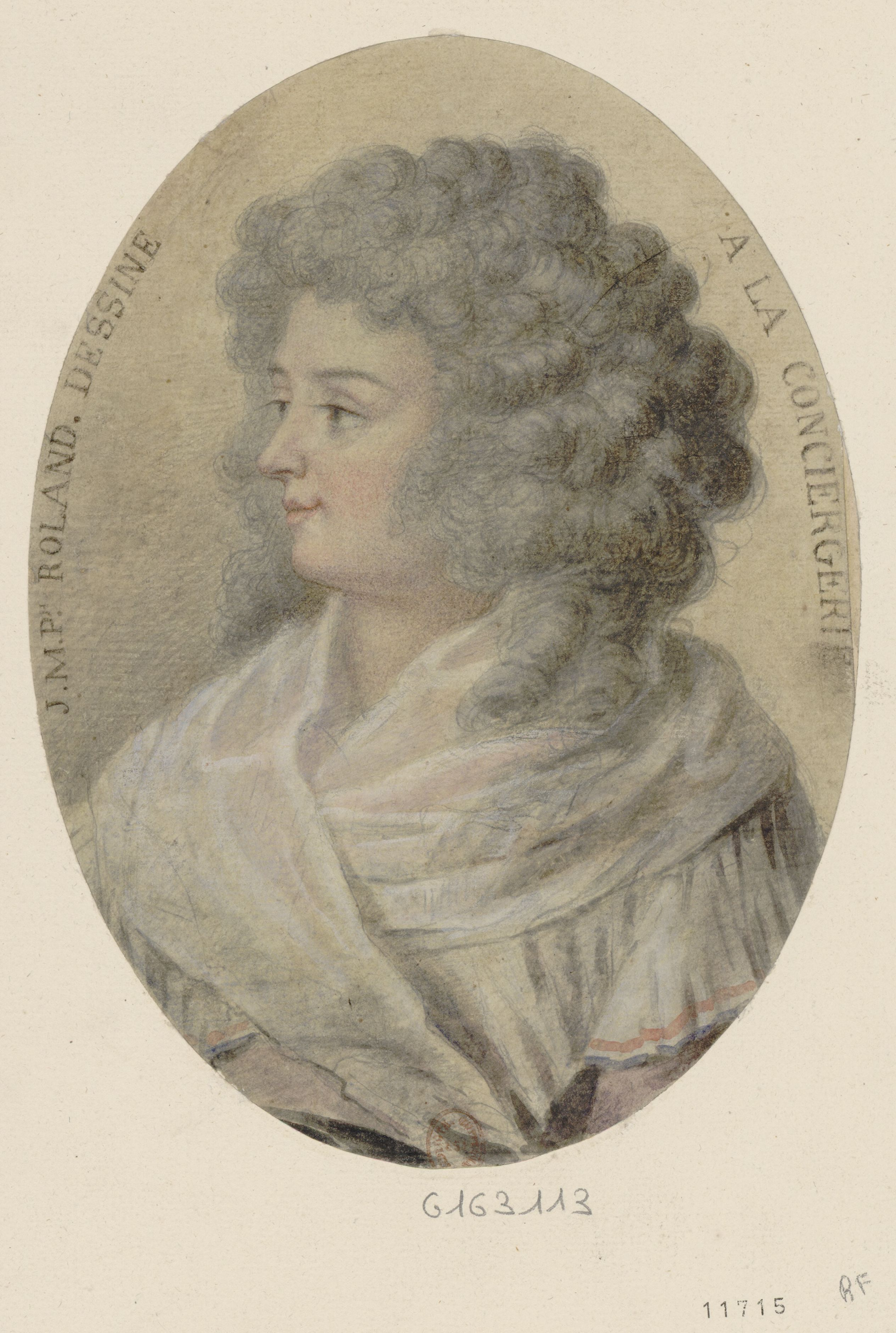 J.M. Ph. Roland dessin[é]e à la Conciergerie, dessin au crayon noir, aquarelle, gouache, coul.